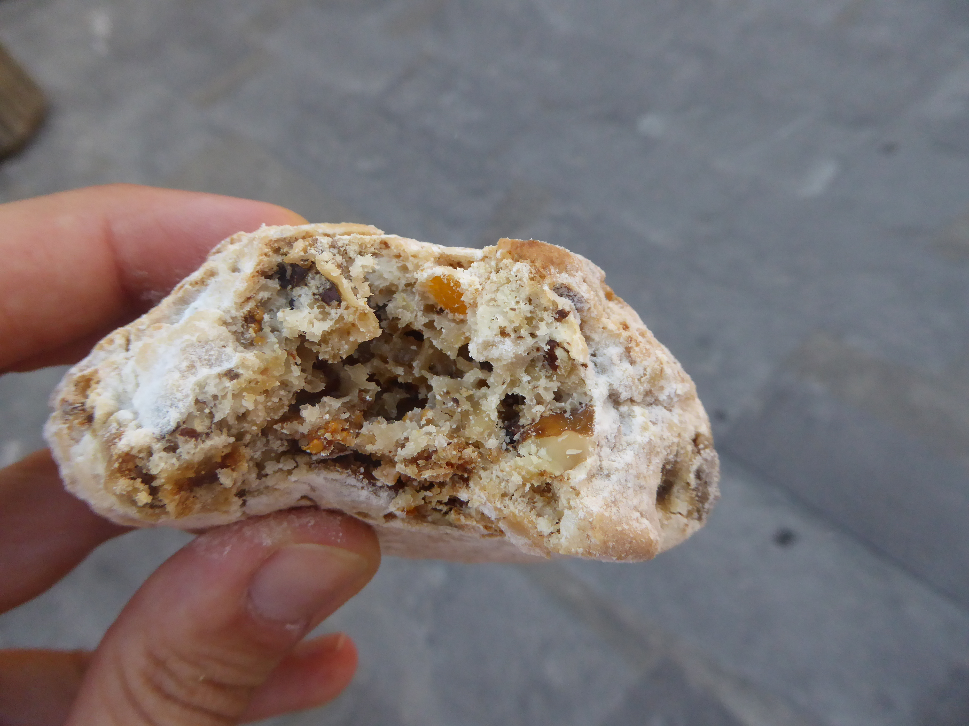 Dolce "cavalluccio" di Siena prodotto dal Forno Indipendenza di Sclavi A. srl.